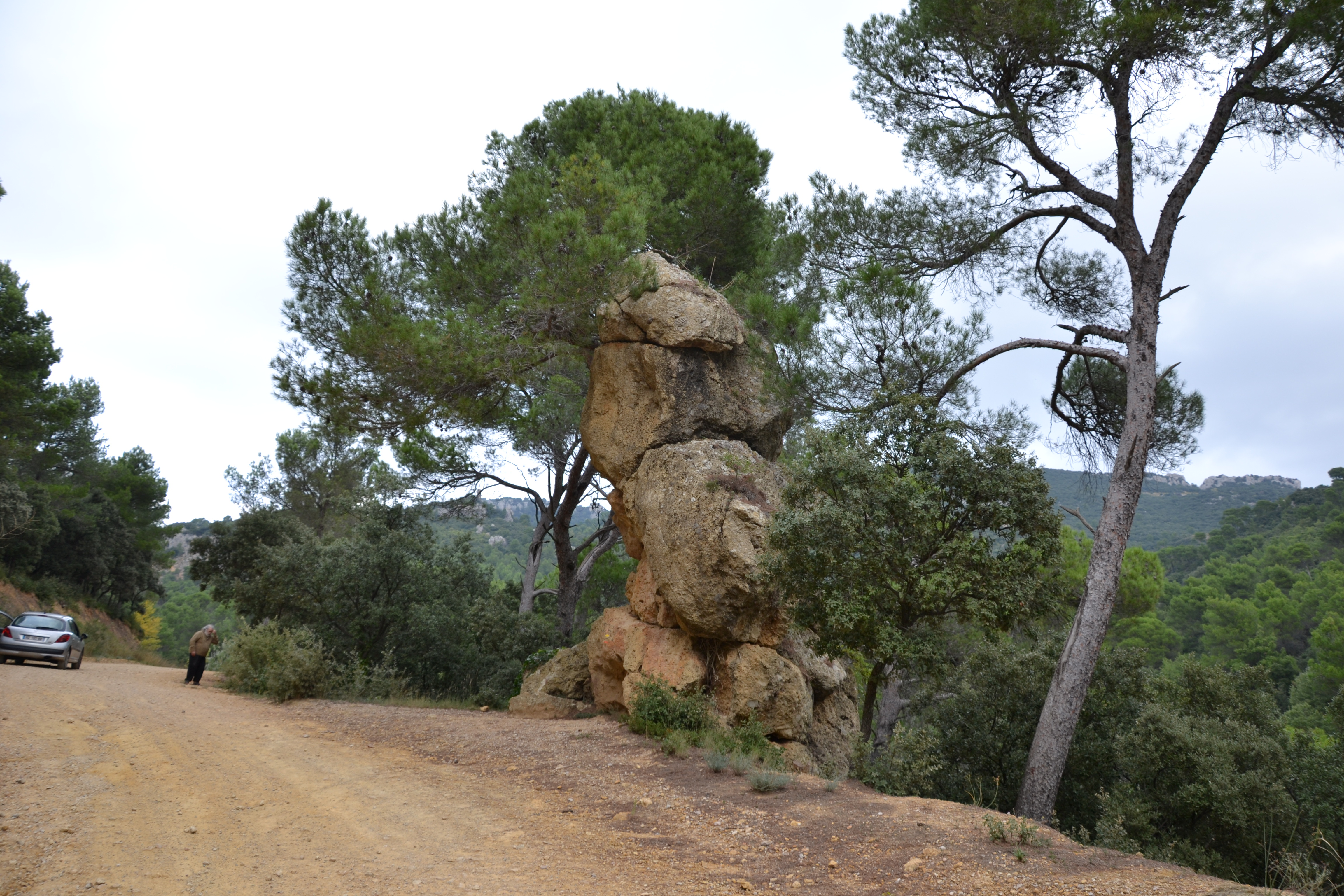 Menhir de Vacqueyras, formation géologique des dentelles de Montmirail